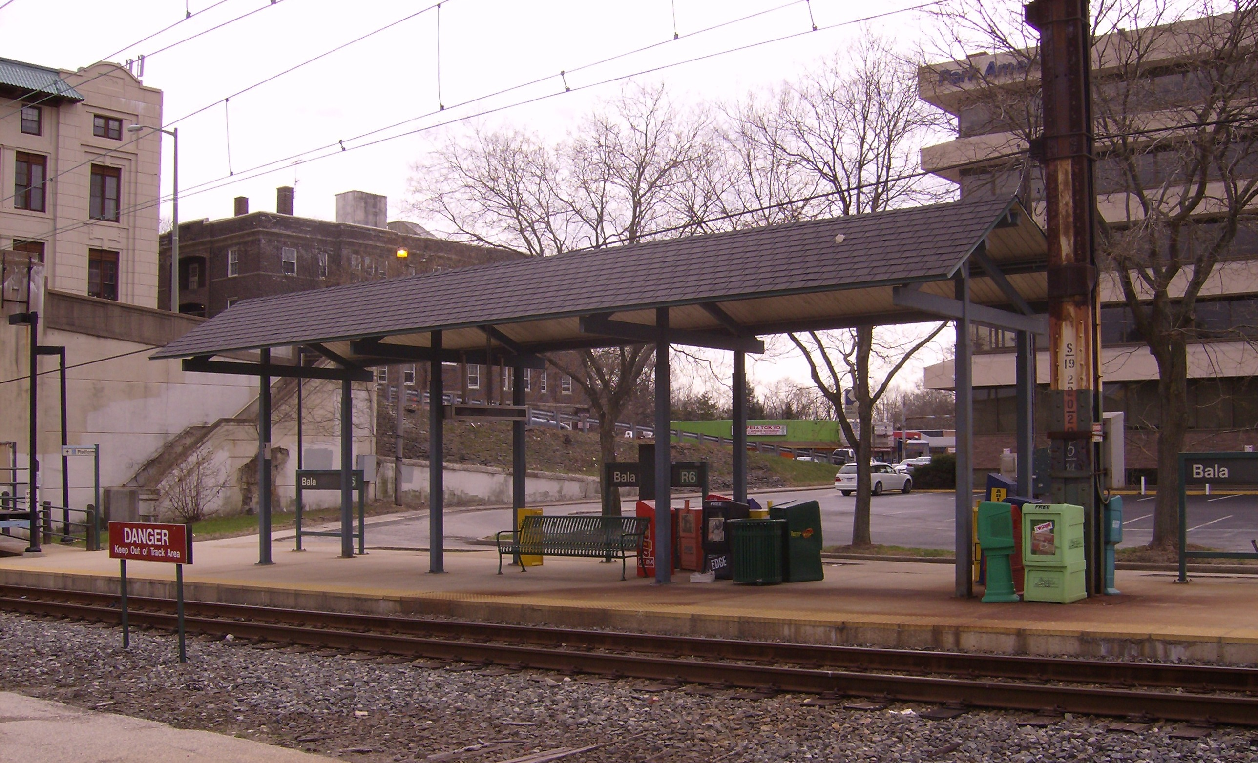 Bala